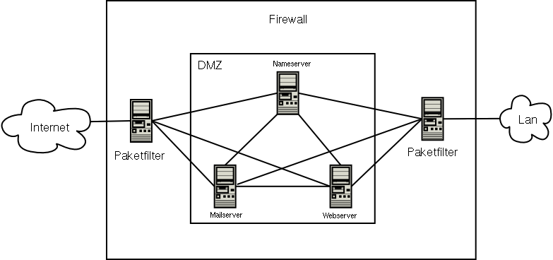 Selbstgemalt/GPL-Software:Überblick über eine DMZ (Demilitarized Zone)